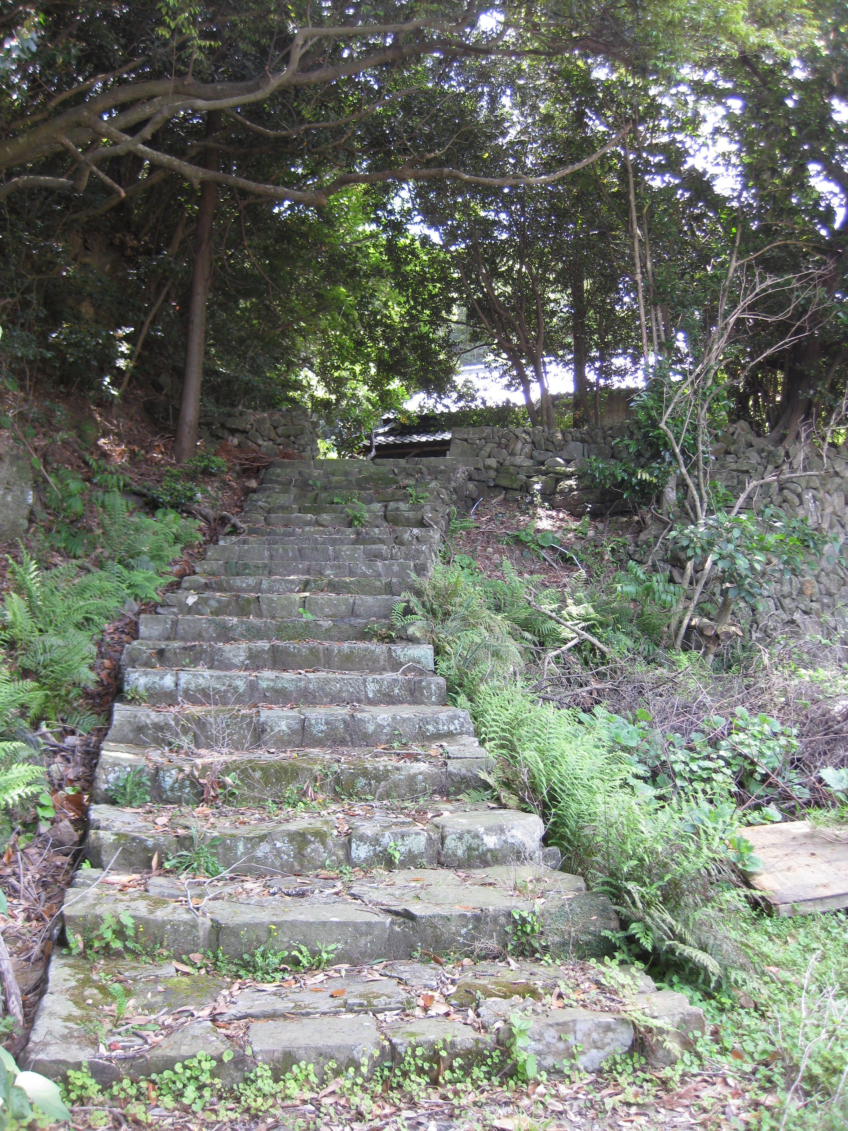 新上五島町続浜ノ浦郷 続代官所址